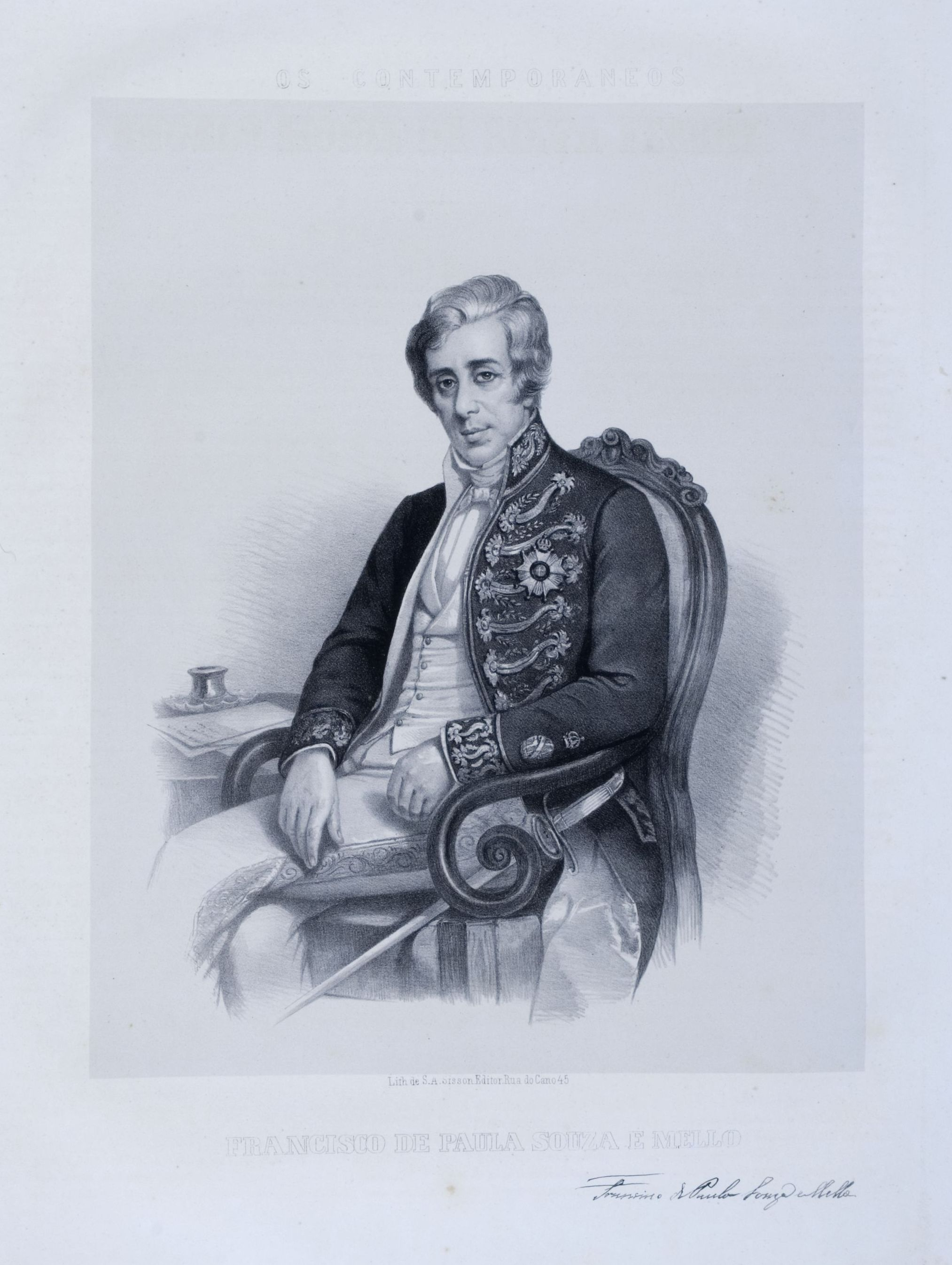 Litografia em preto e branco